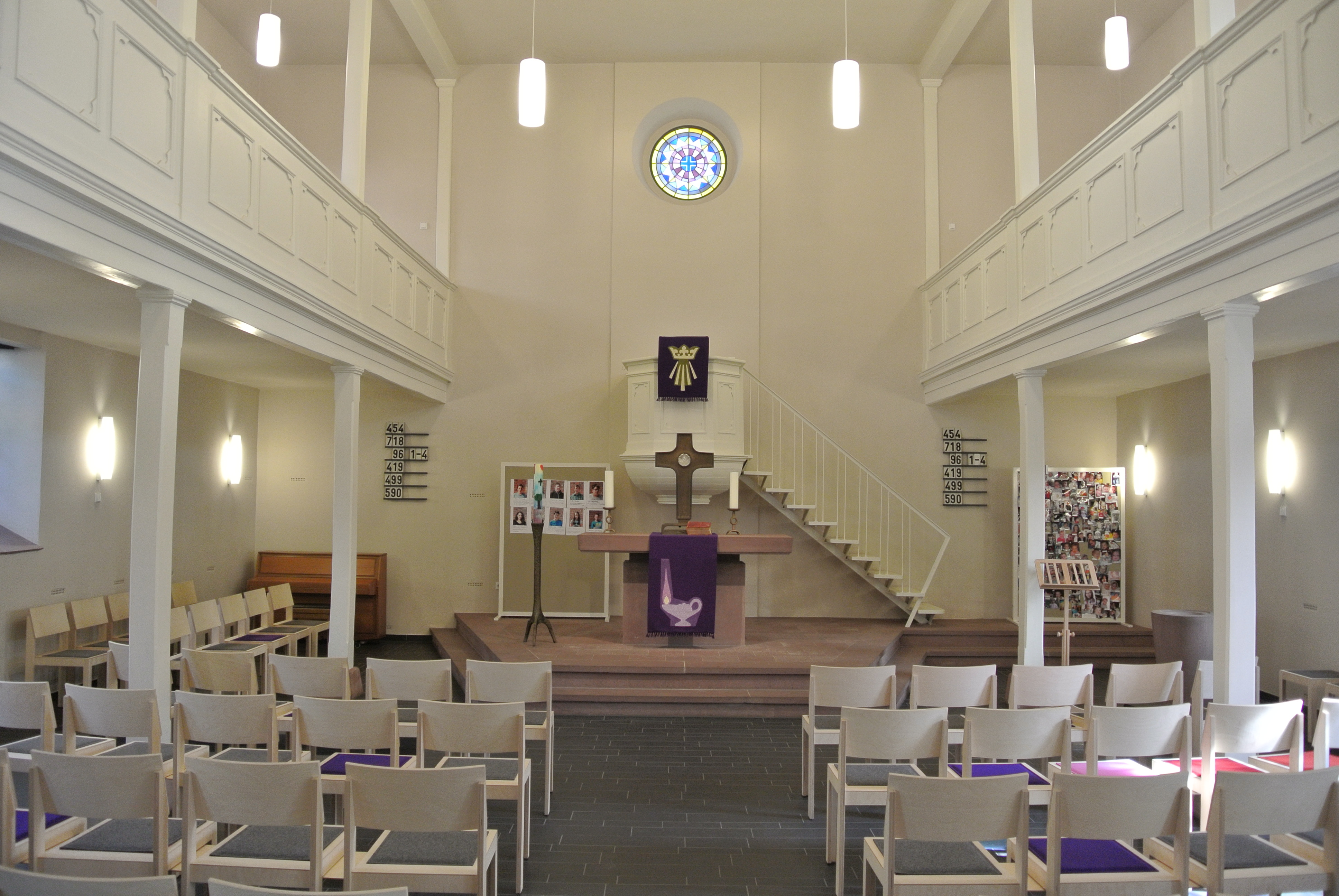 Evangelische Nazarethkirche in Frankfurt-Eckenheim, Innenraum mit Altar, Baudenkmal